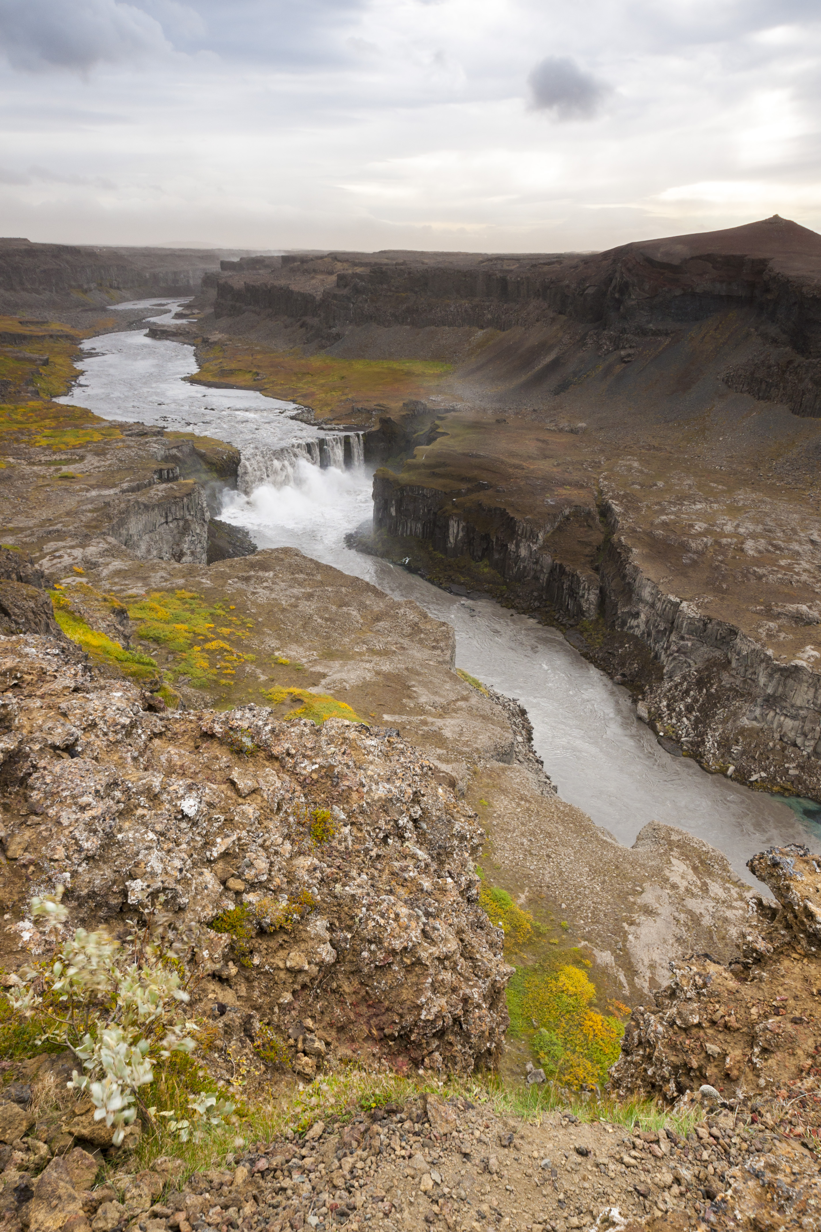 La cascada de Hafragilsfoss